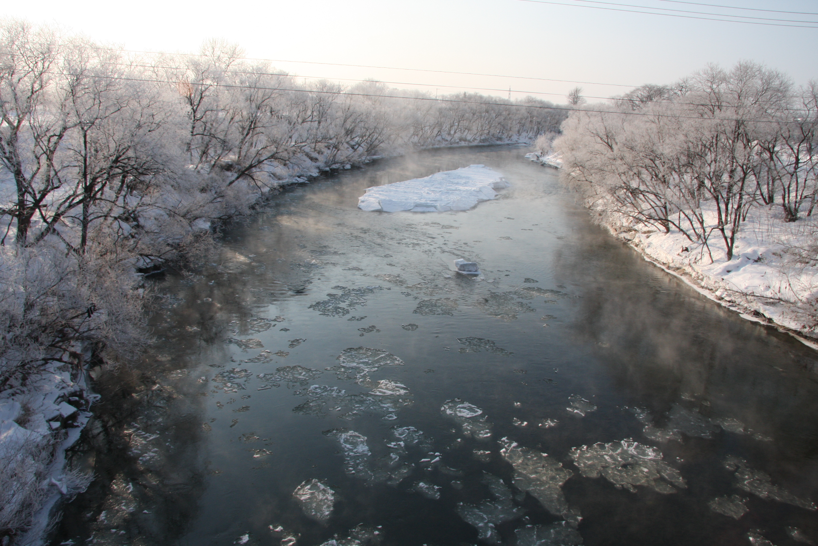 阿寒川 山花橋下流